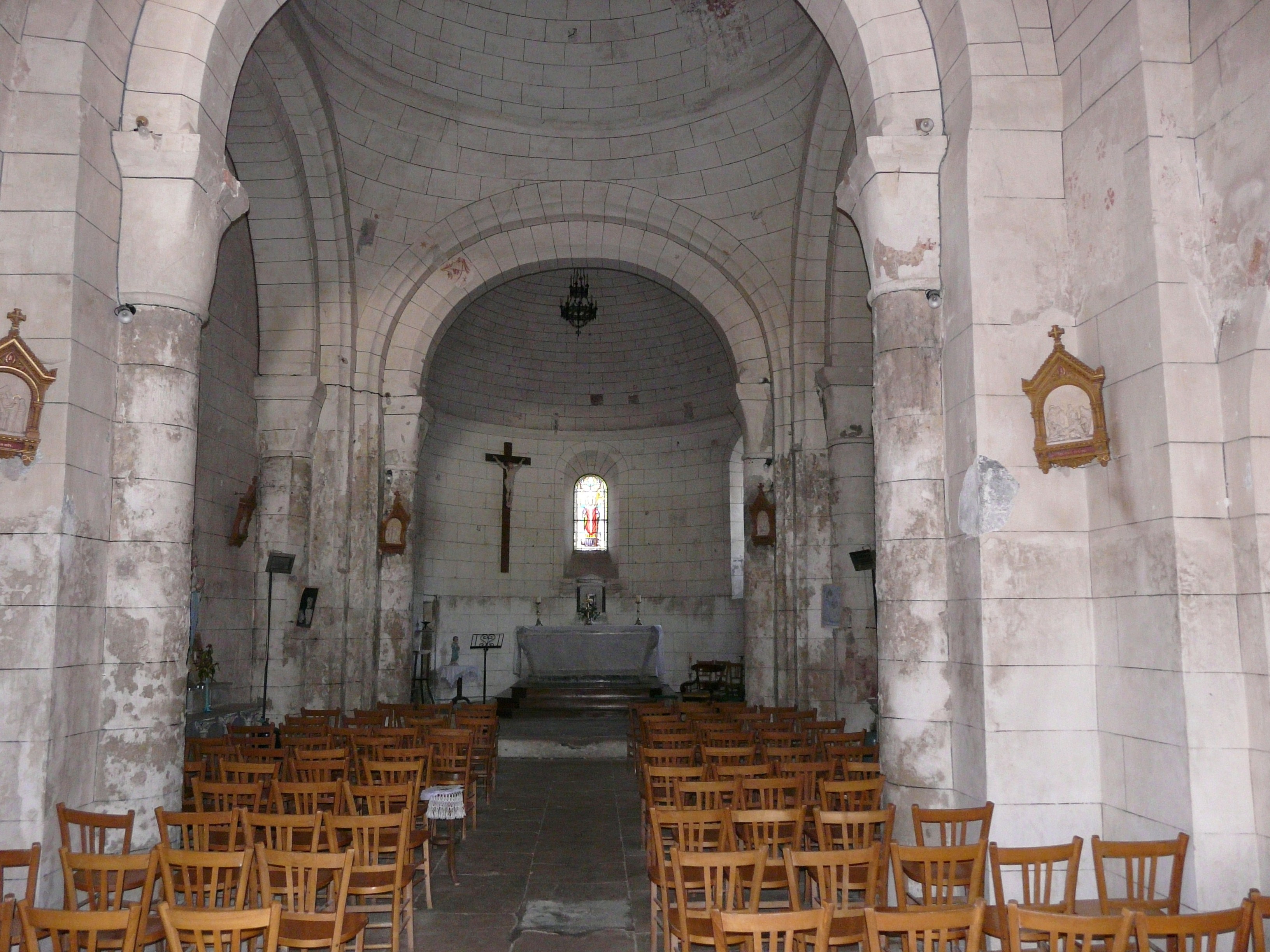 La nef de l'église Saint-Méard, Saint-Méard-de-Drône, Dordogne, France.